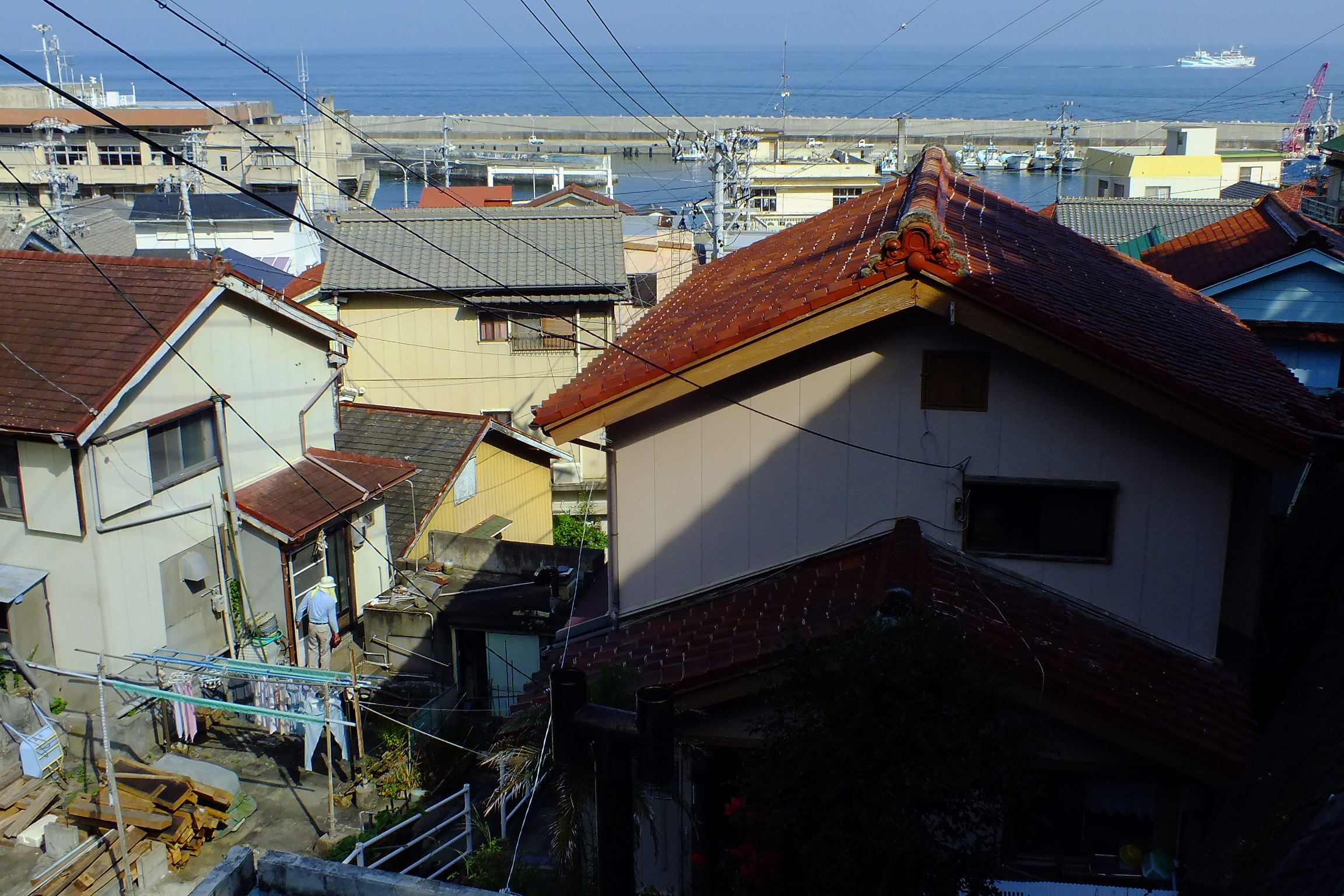 2016-08-05 Kami Island (Mie) 神島民家・路地漁業組合長寺田邸屋根と神島港 三島由紀夫が滞在した漁業組合長寺田邸 『潮騒』